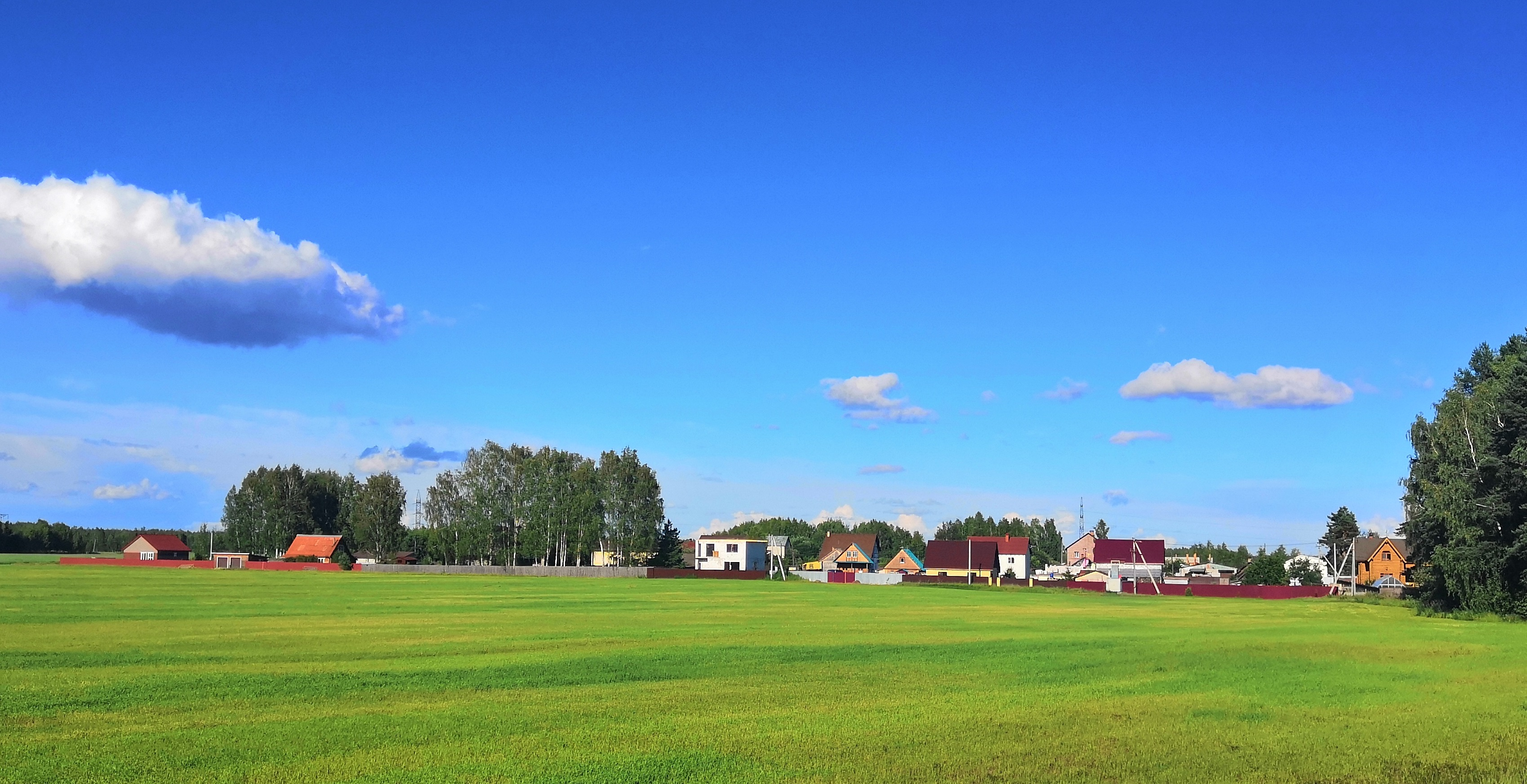 Деревня Липовицы, вид с запада.